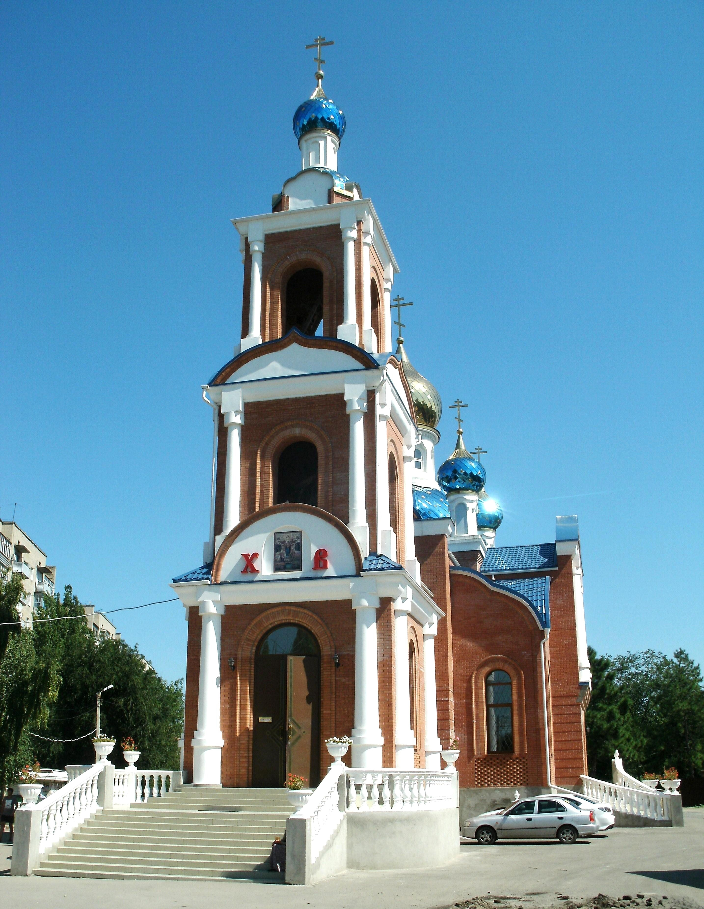 Полковой храм Азовской иконы Божией Матери построен в 2006 году в честь 365-летия Азовского осадного сидения на пожертвования азовчан и жителей Ростовской области